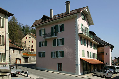 Lucens: Route d'Yvonand / Ruelle de l'Hélvétia